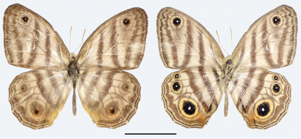 Euptychia sophiae